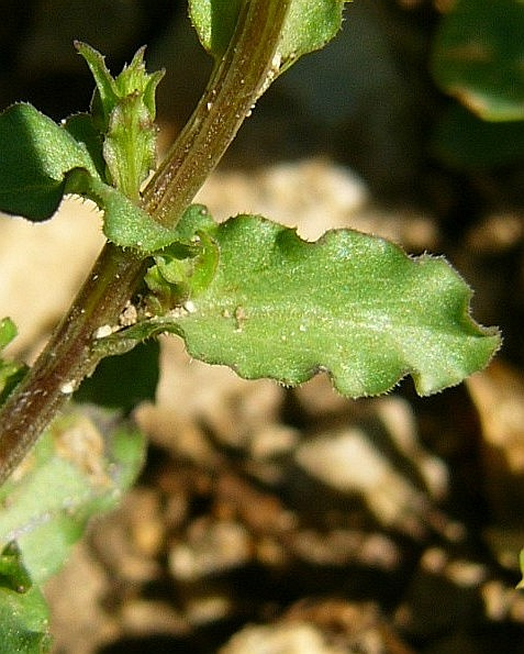 Frauenspiegel Kleinblütiger Blätter